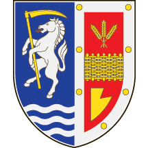 Grb Bačke Palanke